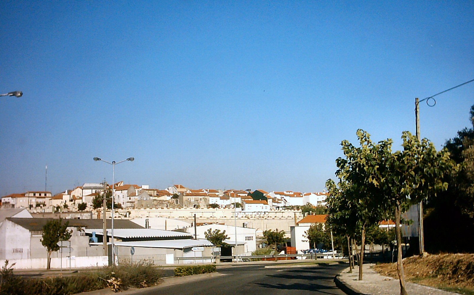 Vista de Alcanena, Portugal